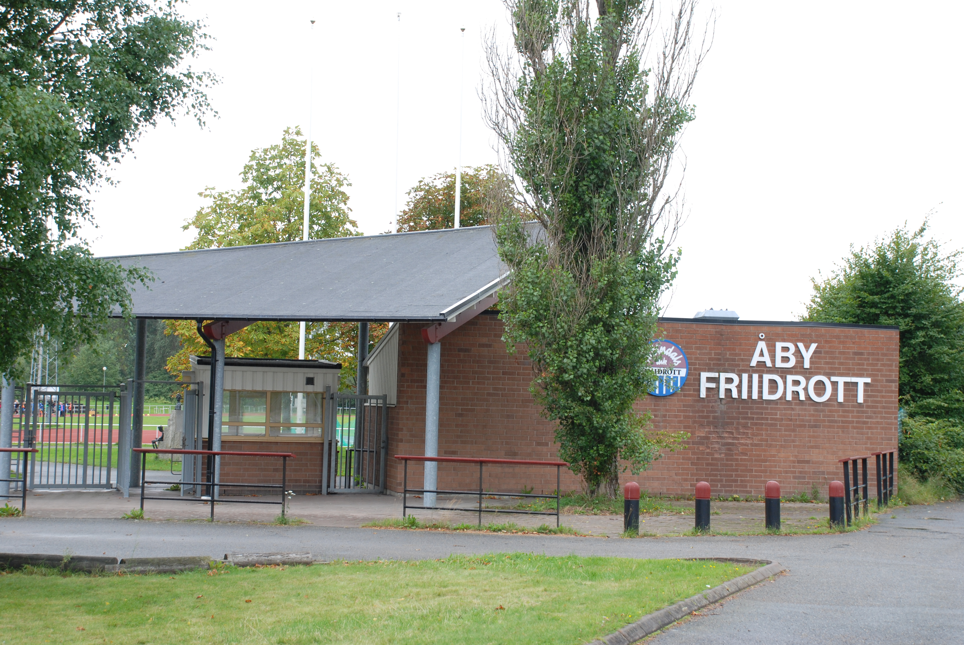 Åby friidrottsarena vid Idrottsvägen i Mölndal.